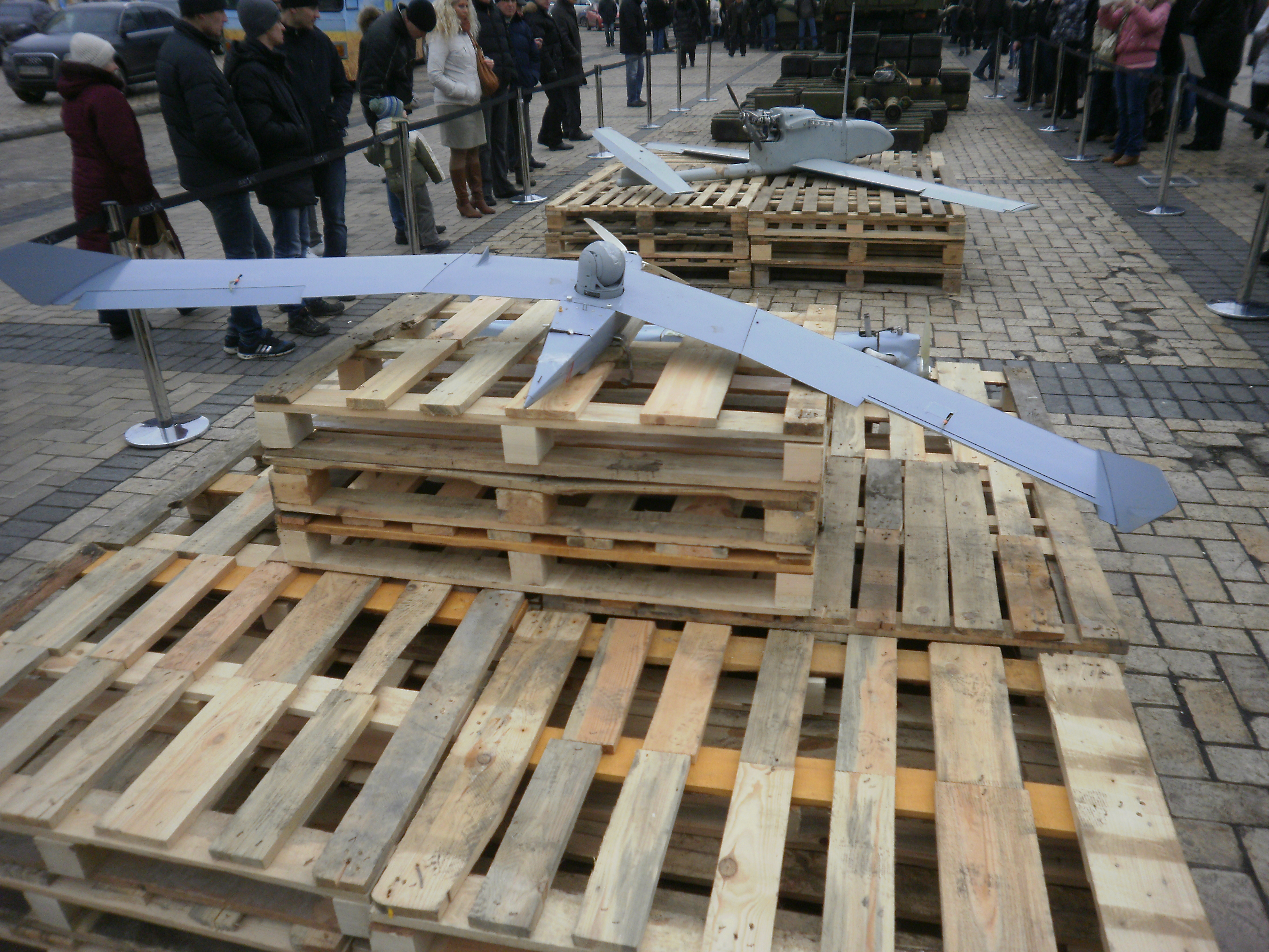 фрагмент Виставки-доказу присутності російської зброї в Україні-5